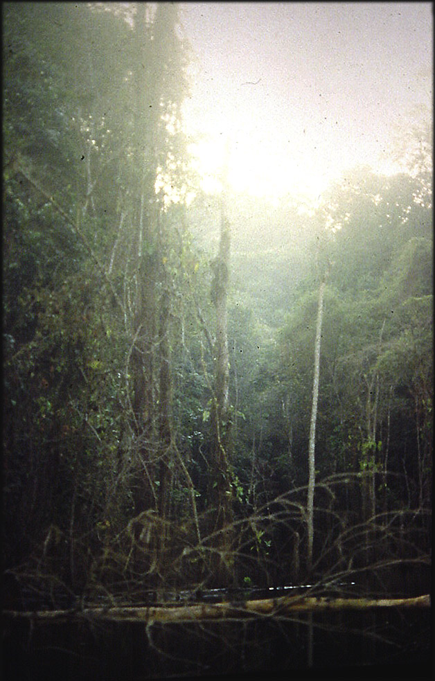 Photos prises sur le fleuve Sinnamary ou ses berges lors de la fin de la montée des eaux induites par le barrage EDF de Petit saut, en Guyane, en décembre 1995. De très nombreux arbres dont le système racinaire n'est normalement pas immergé sont morts noyés.